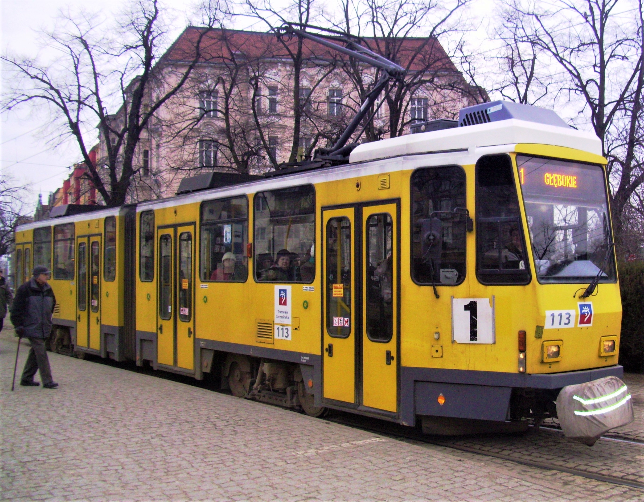 Wagon Tatra KT4D w Szczecinie